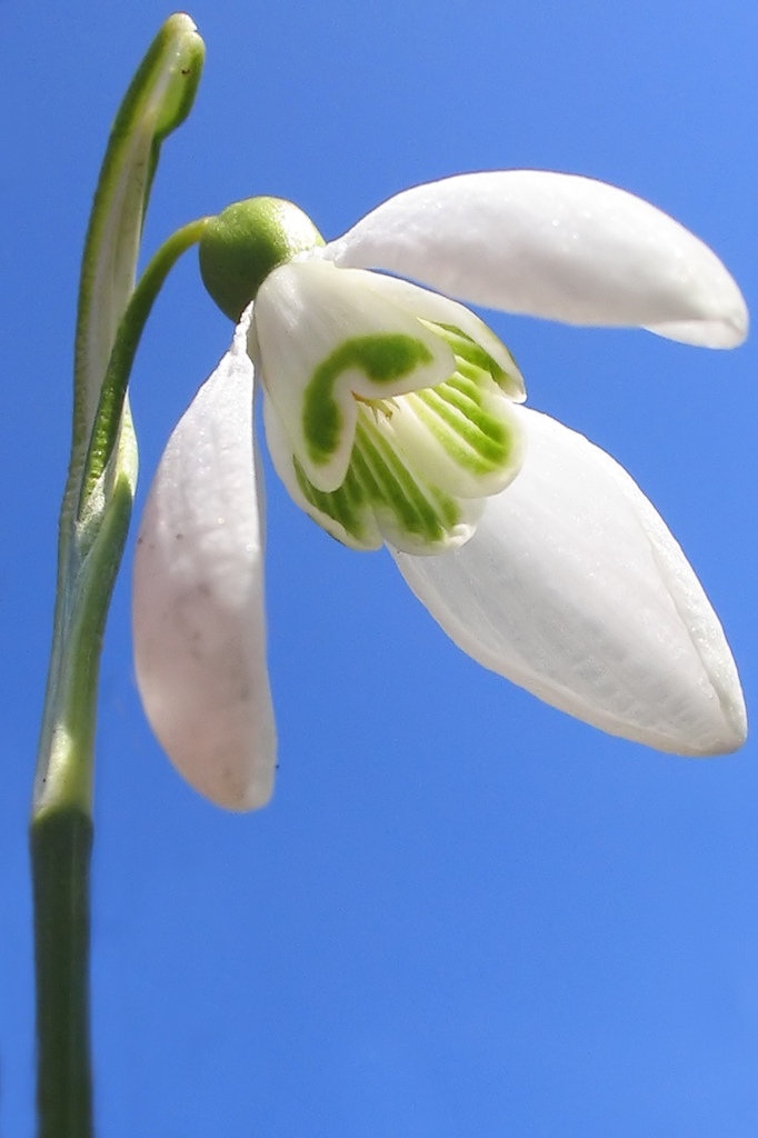 Nahaufnahme vom Kleinen Schneeglöckchen (Galanthus nivalis)